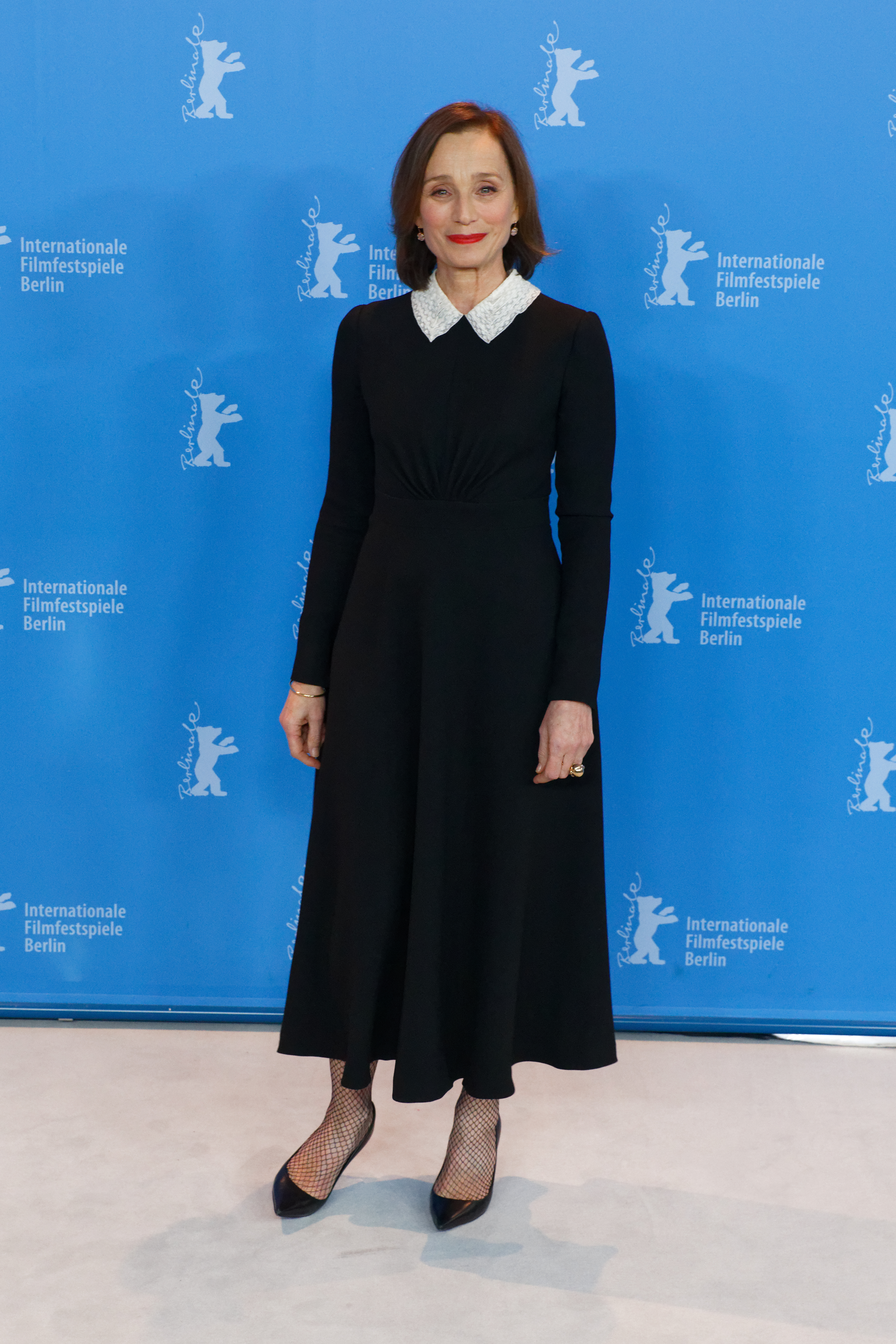 Kristin Scott Thomas beim Photo Call zu The Party bei der Berlinale 2017